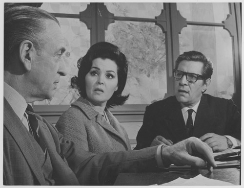 Roberto Airaldi, Nelly Panizza y Francisco de Paula en "Maternidad sin hombres" (1968).